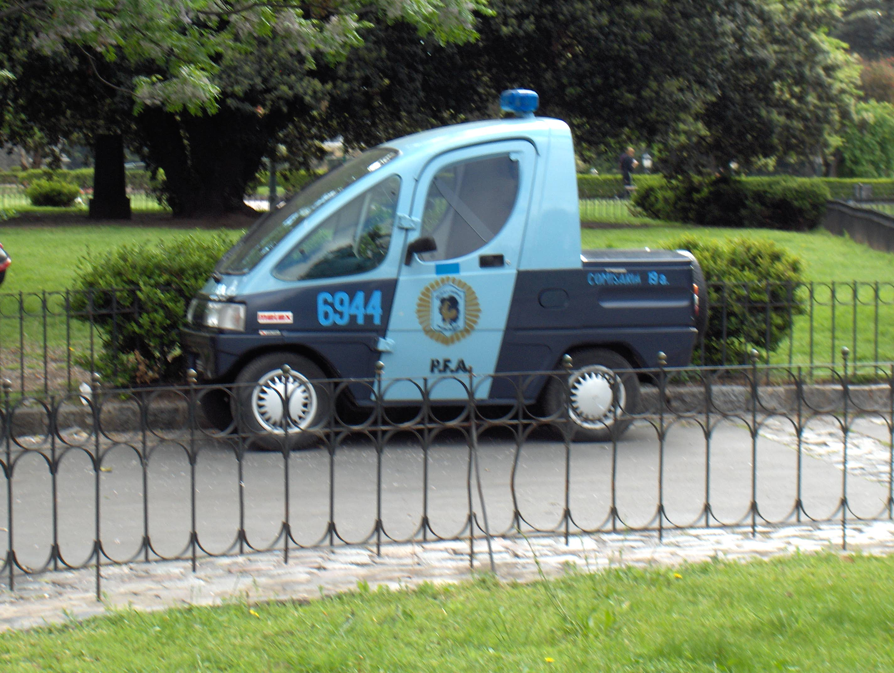 Carro utilizado por la Pôlicía Federal Argentina, en la Ciudad de Buenos Aires.